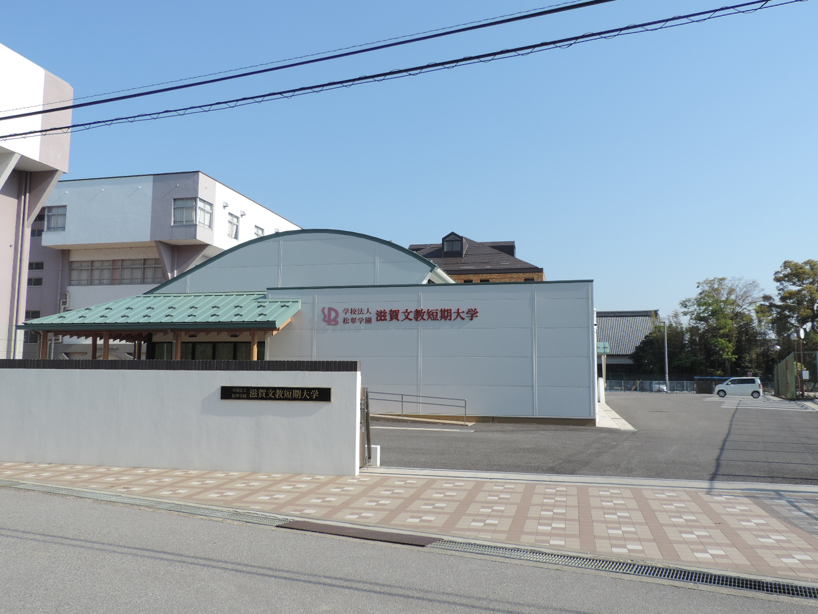 滋賀文教短期大学（滋賀県長浜市）